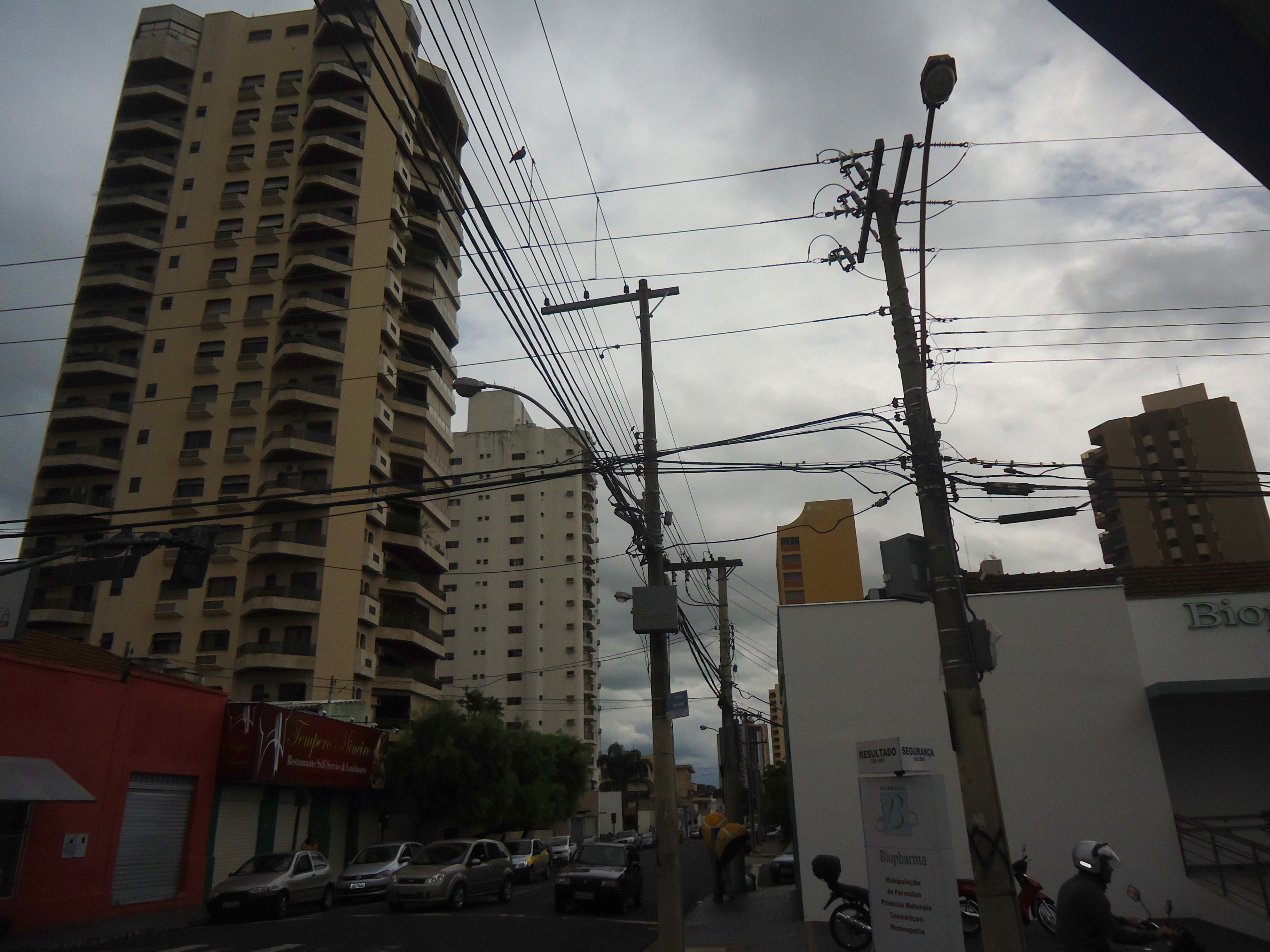 Av. Cipriano Del Fávero - Centro de Uberlândia.